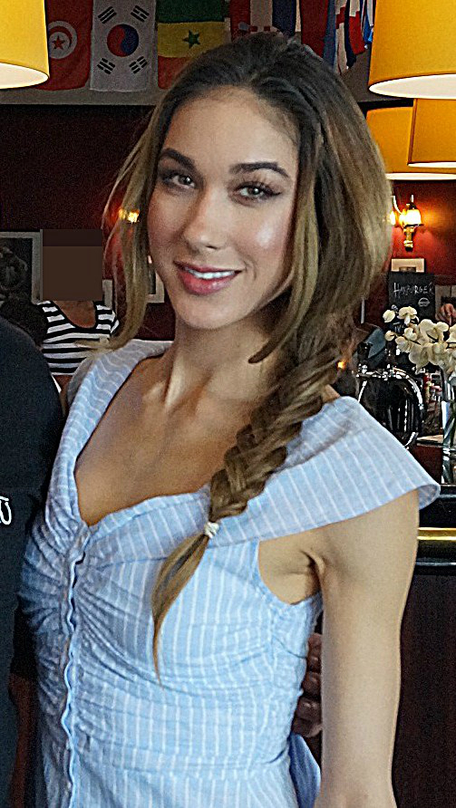 Tancerka Ida Nowakowska.